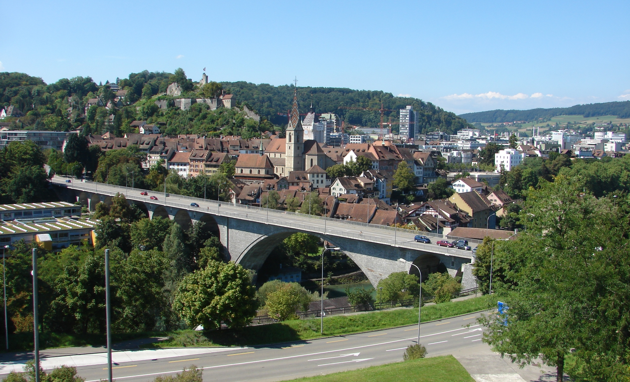 Die Aussicht vom Hallerbau (Gebäude Nr. 1) der Kantonsschule Baden